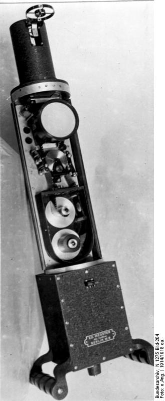 Luftbildmessung im Ersten Weltkrieg Information added by Wikimedia users.